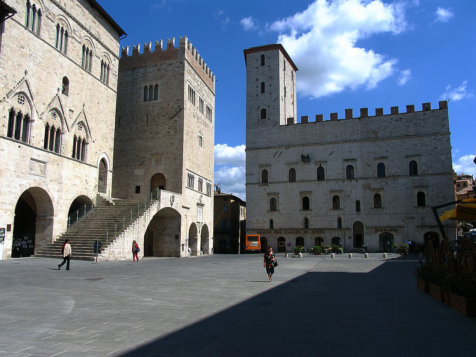 Todi, Umbria, Italia